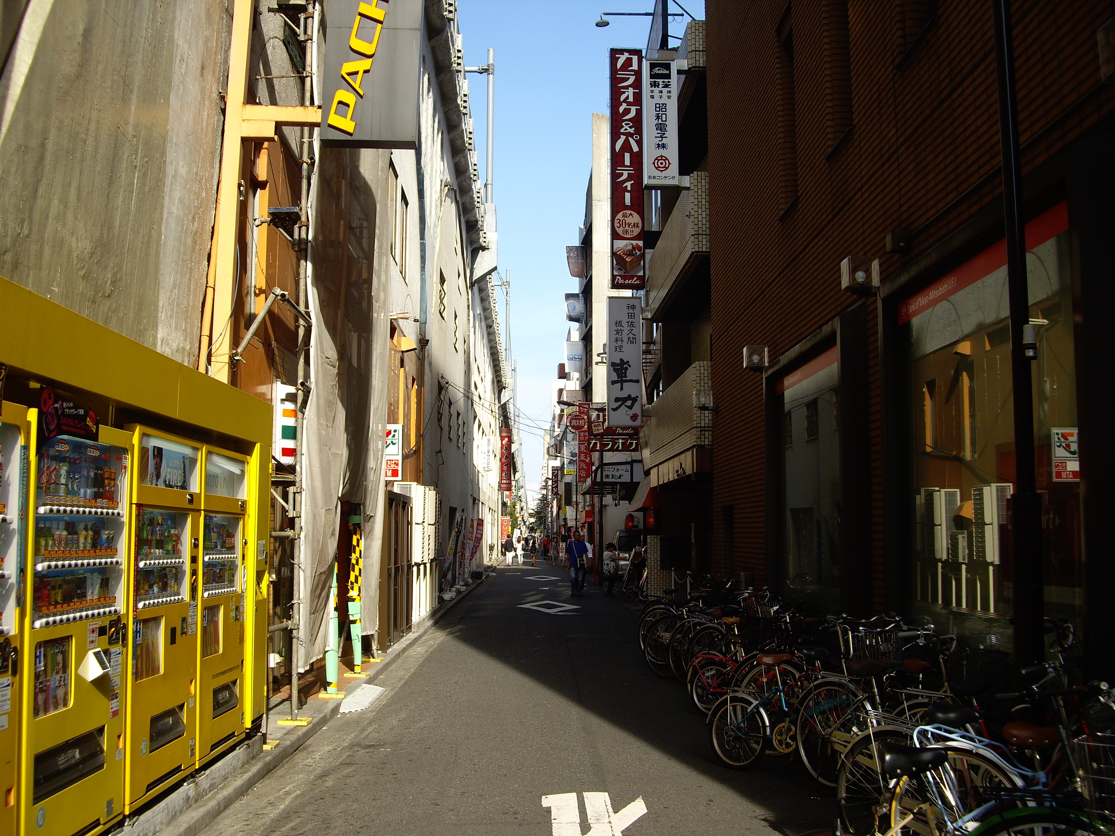 神田平河町